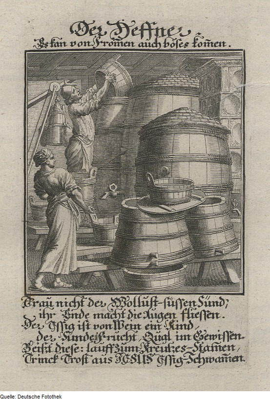 Original image description from the Deutsche Fotothek Ständebuch & Beruf & Handwerk & Brenner & Branntwein